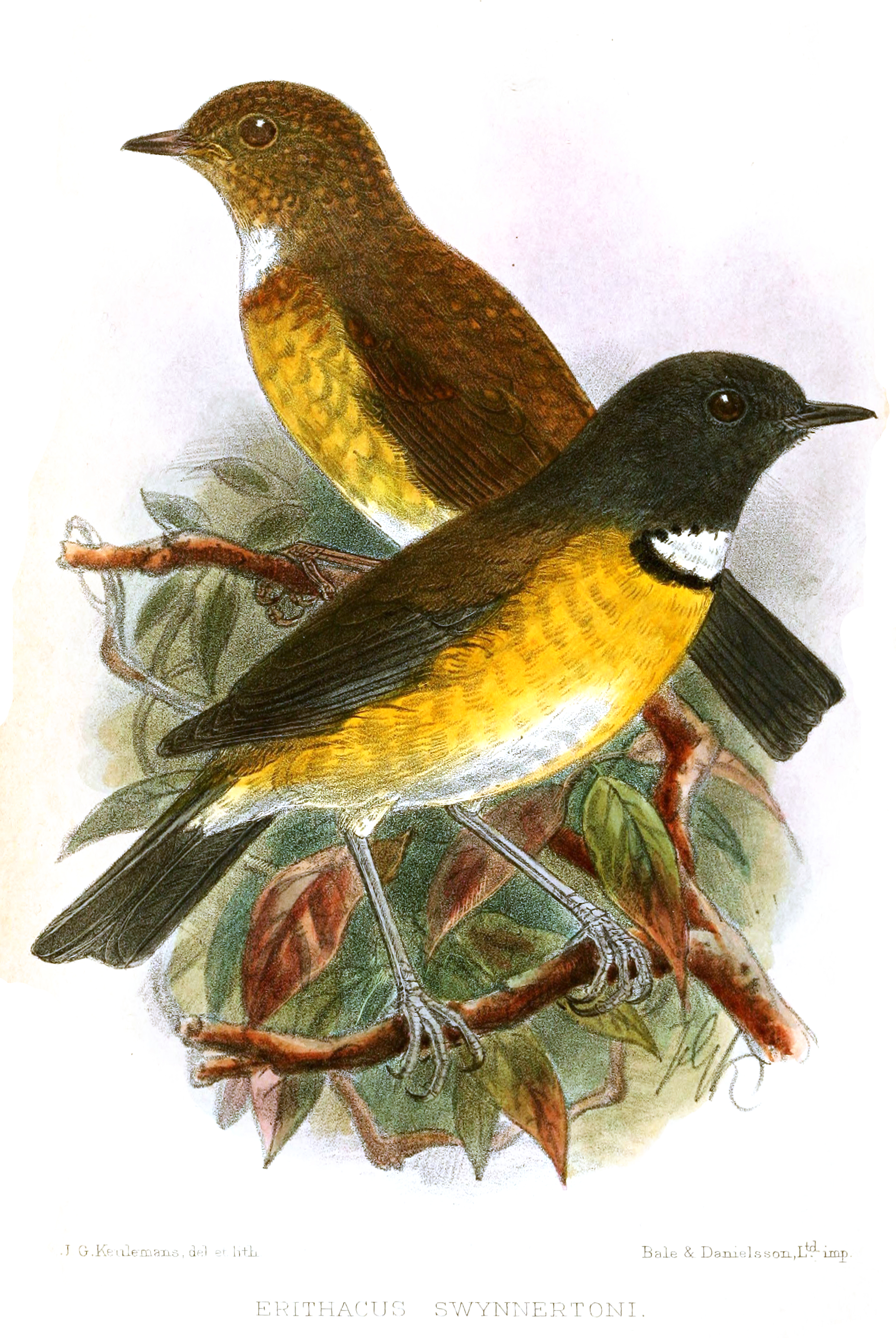 Erithacus swynnertoni = Swynnertonia swynnertoni